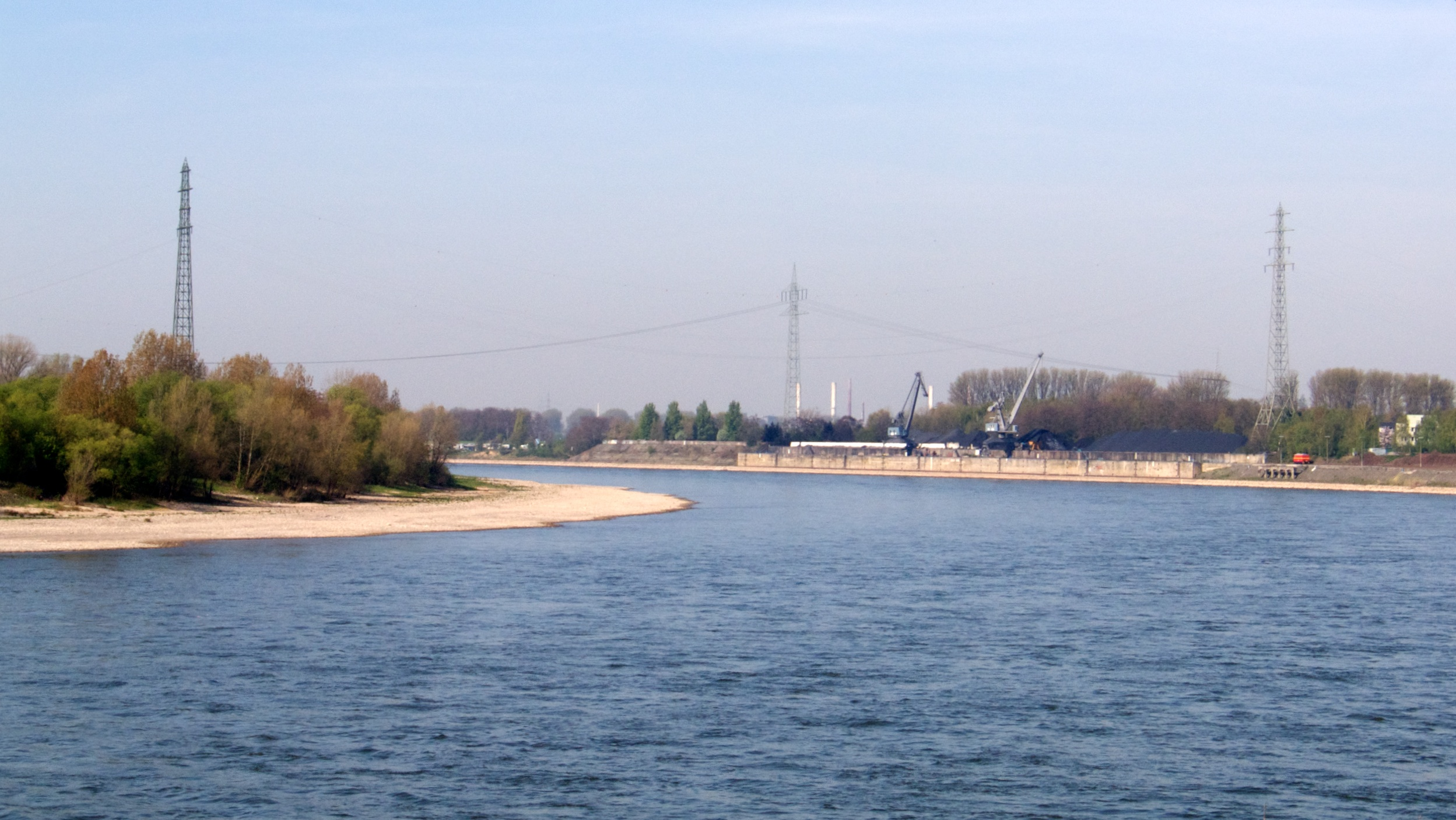 Rhein-Freileitungskreuzung Reisholz von der Bonner Straße aus gesehen